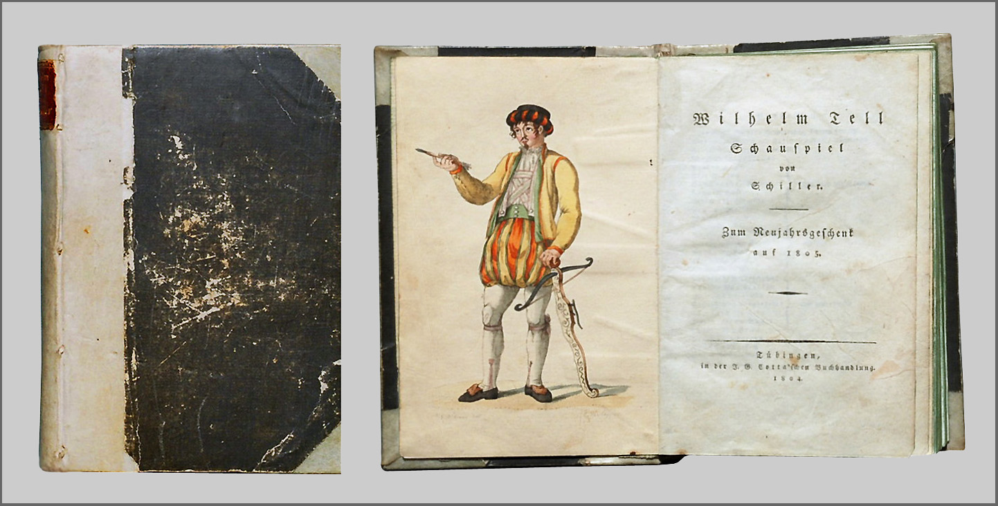 Friedrich Schiller: Willhelm Tell. Erstdruck 1804. Handkolorierter Kupferstich von Christian Müller (1766 – 1824) nach einer Zeichnung von Georg Melchior Kraus (1737 – 1806).